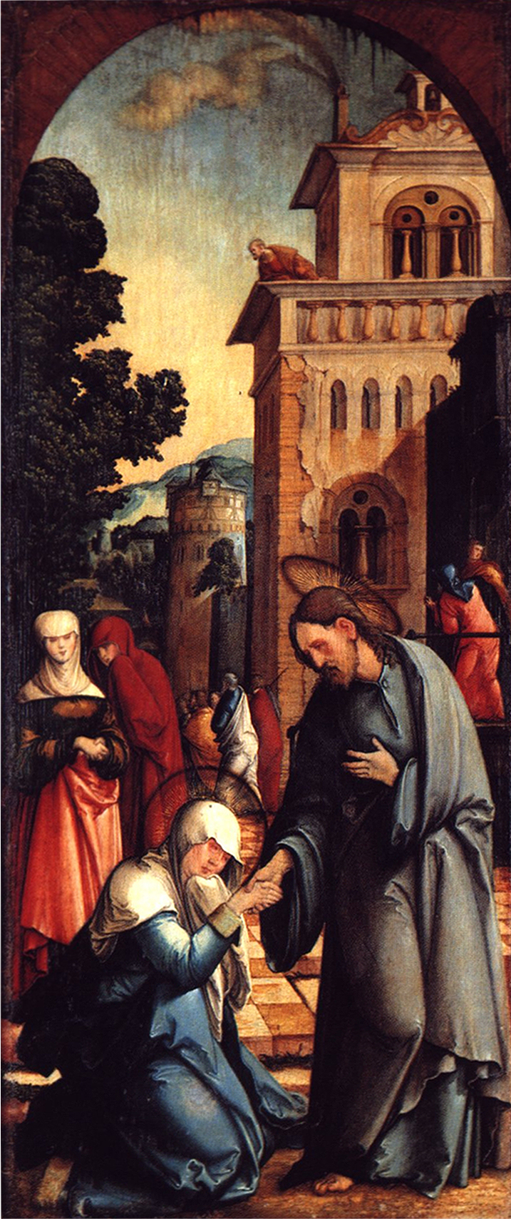 Wildensteiner Altar; rechter Standflügel, Abschied Christus von der Mutter; (bei der Nachbildung auf Burg Wildenstein nicht realisiert) Staatsgalerie Stuttgart, L 1381 (früher Donaueschingen, Fürstenbergsammlungen, Inv.Nr. 76-80)